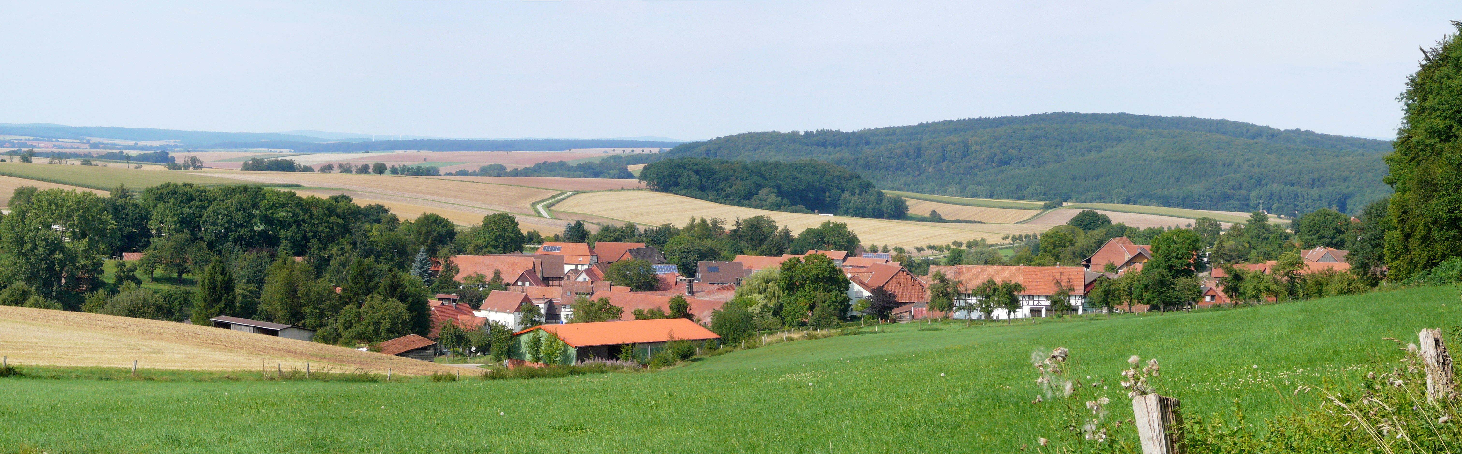 Blick von Süden auf Weißenborn, Gemeinde Gleichen, Südniedersachsen; im Hintergrund rechts der Rote Uferberg